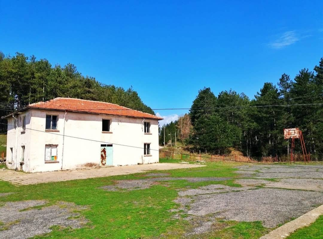 Училище